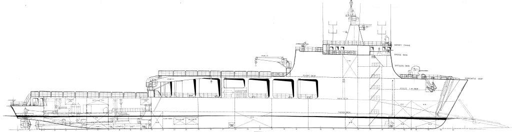 תכנון "פלשת" 113 מ', רוחב 17.5 מ', מהירות 15 קשר ודחי 5,000 טון.